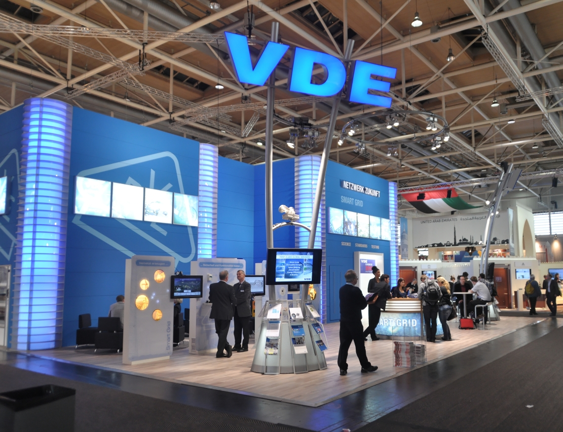 Hannover-Messe April 2012 Dieses Foto entstand durch die Mithilfe des gemeinnützigen Vereins Skillshare bei der Akkreditierung als Fotograf. Infos unter skillshare.eu Skillshare e.V. ist ein eingetragener gemeinnütziger Verein zur Förderung der Bildung durch Unterstützung der Erstellung, Sammlung und Verbreitung so genannten freien Wissens. IBAN: DE16 8306 5408 0004 8850 66 BIC: GENODEF1SLR Bank: VR-Bank Altenburger Land